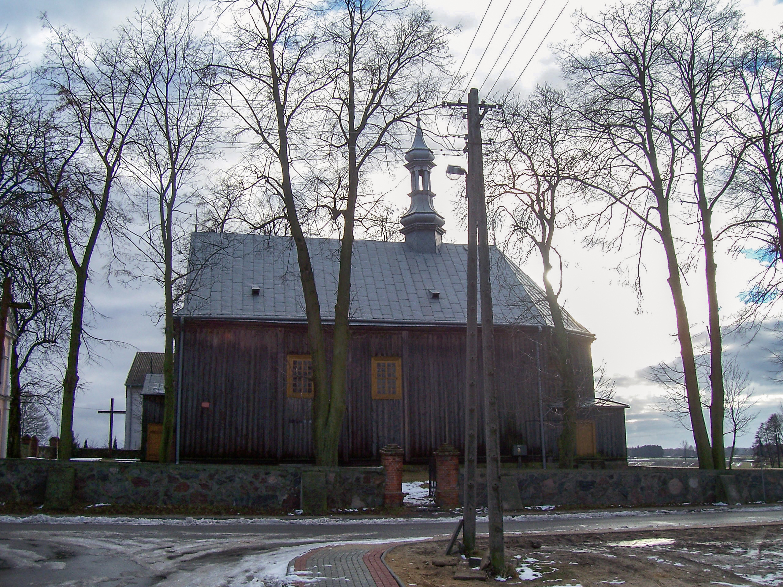 Rozbity Kamień - kościół parafialny p.w. Świętej Trójcy, drewn., 1777, XIX, XX w. (zabytek nr 424)